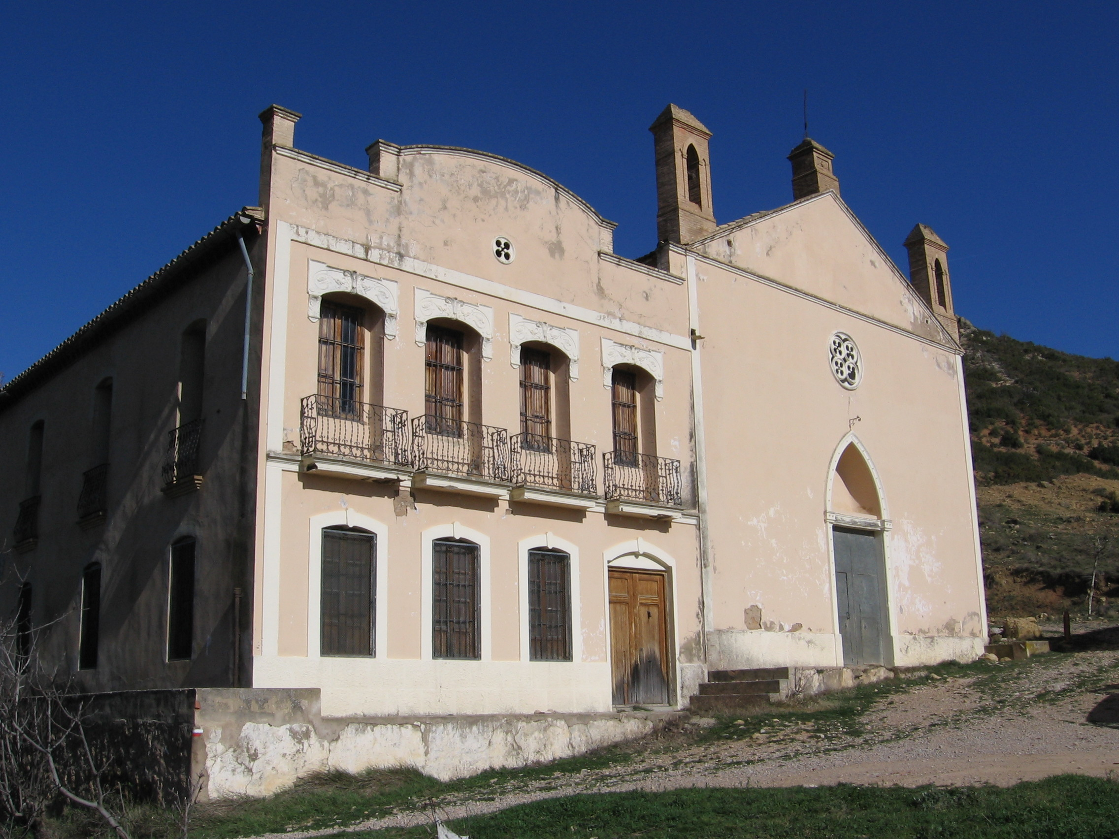 Fotografía de la antigua iglesia y escuela de "El reatillo", (aldea de Siete Aguas (Valencia)).